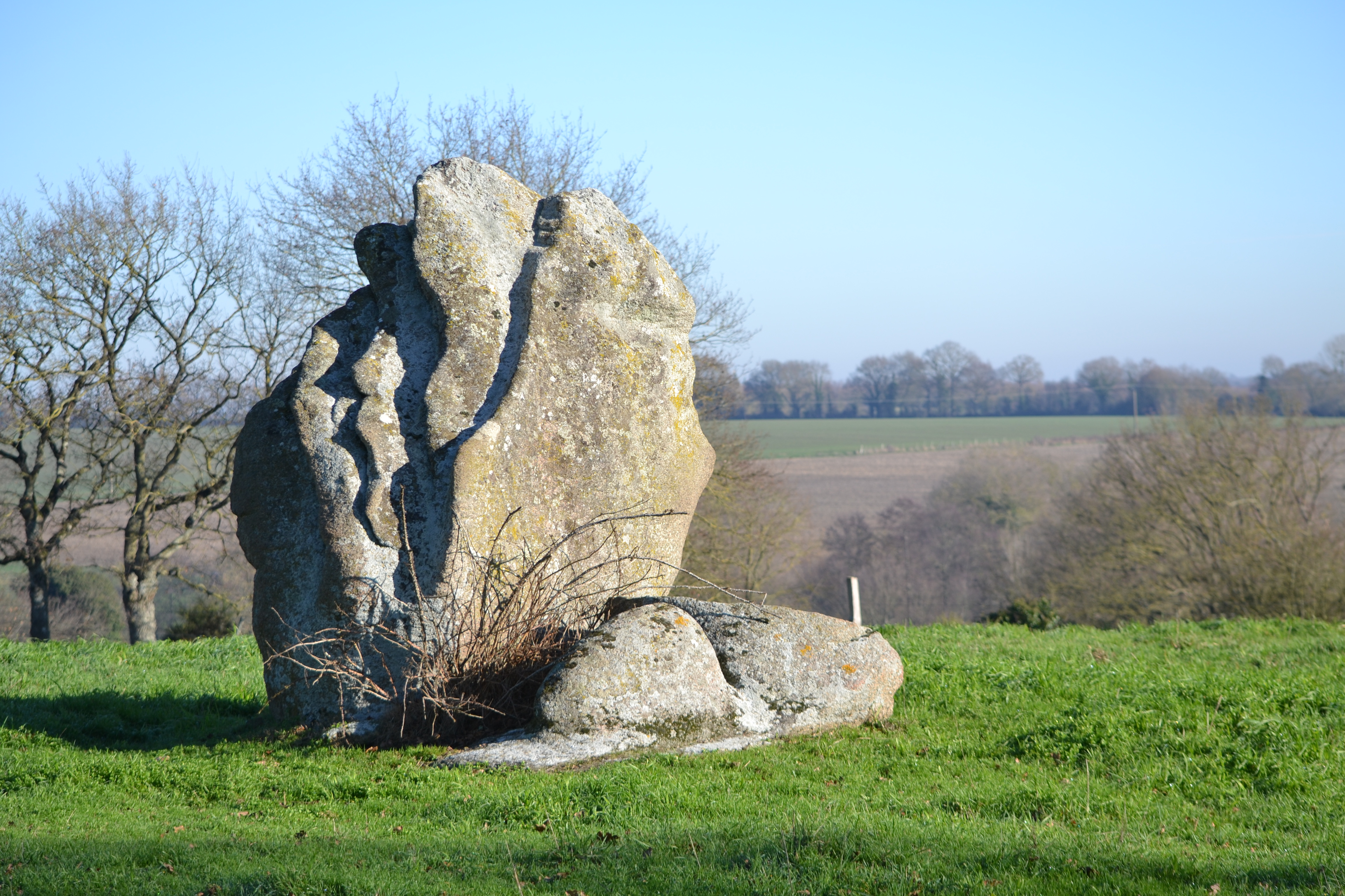 Pierre Levée de Charbonneau, la Renaudière (49).